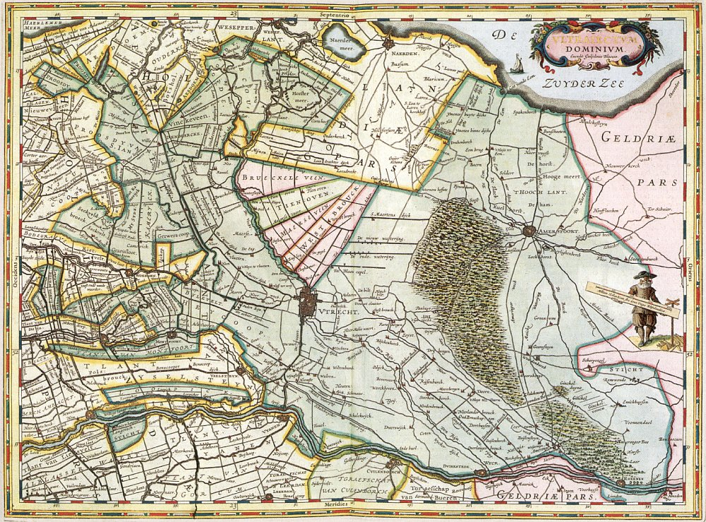 Ultraiectum Dominium (Heerlijkheid Utrecht)